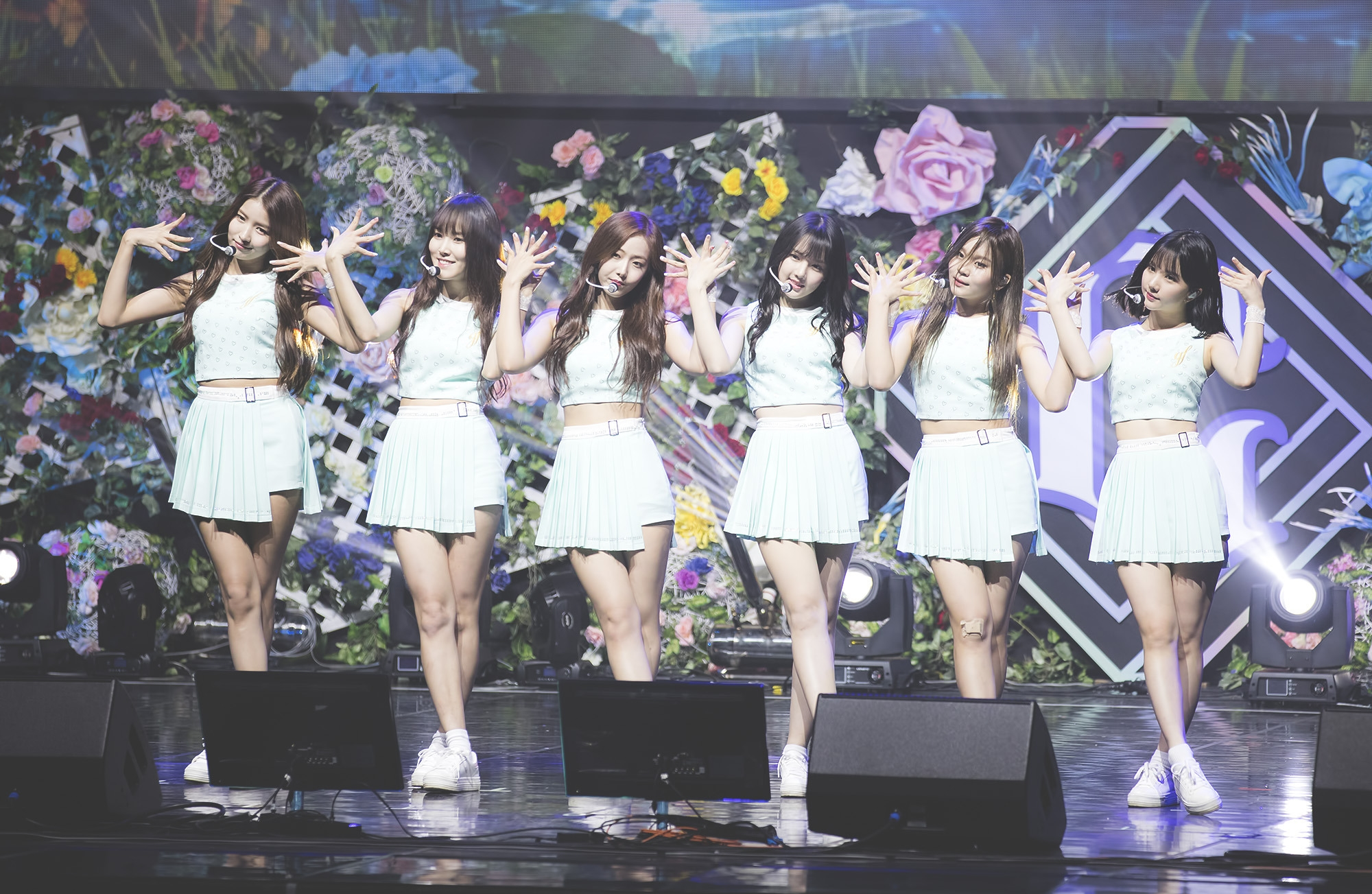 0801 쇼케이스